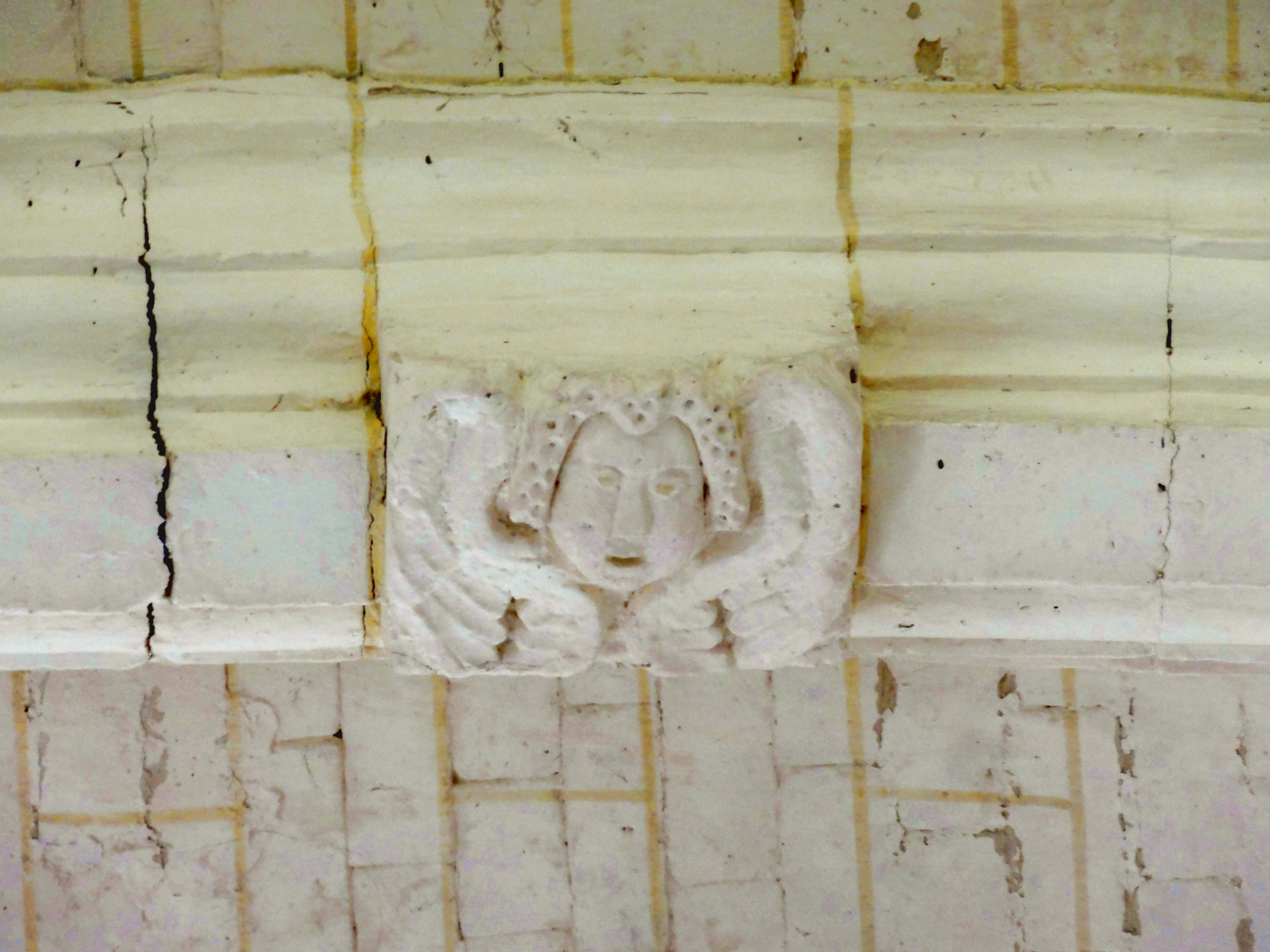 Intérieur de l'église - voir titre.